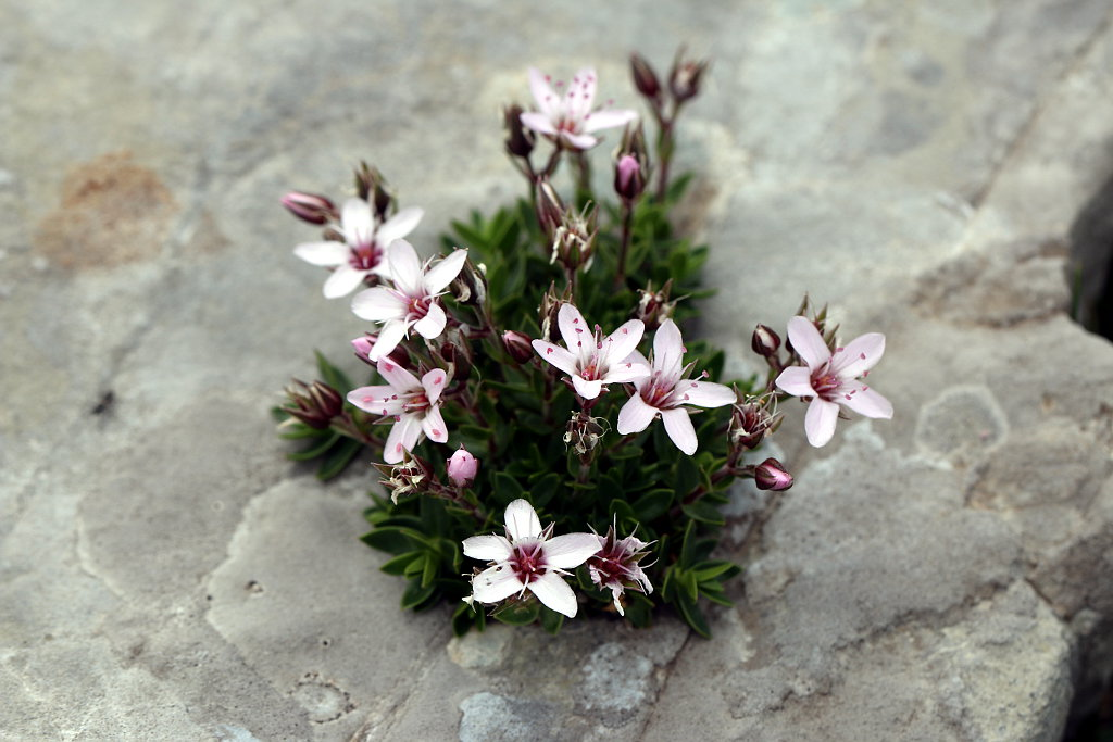 Arenaria purpurascens, La Pierre Saint-Martin, France